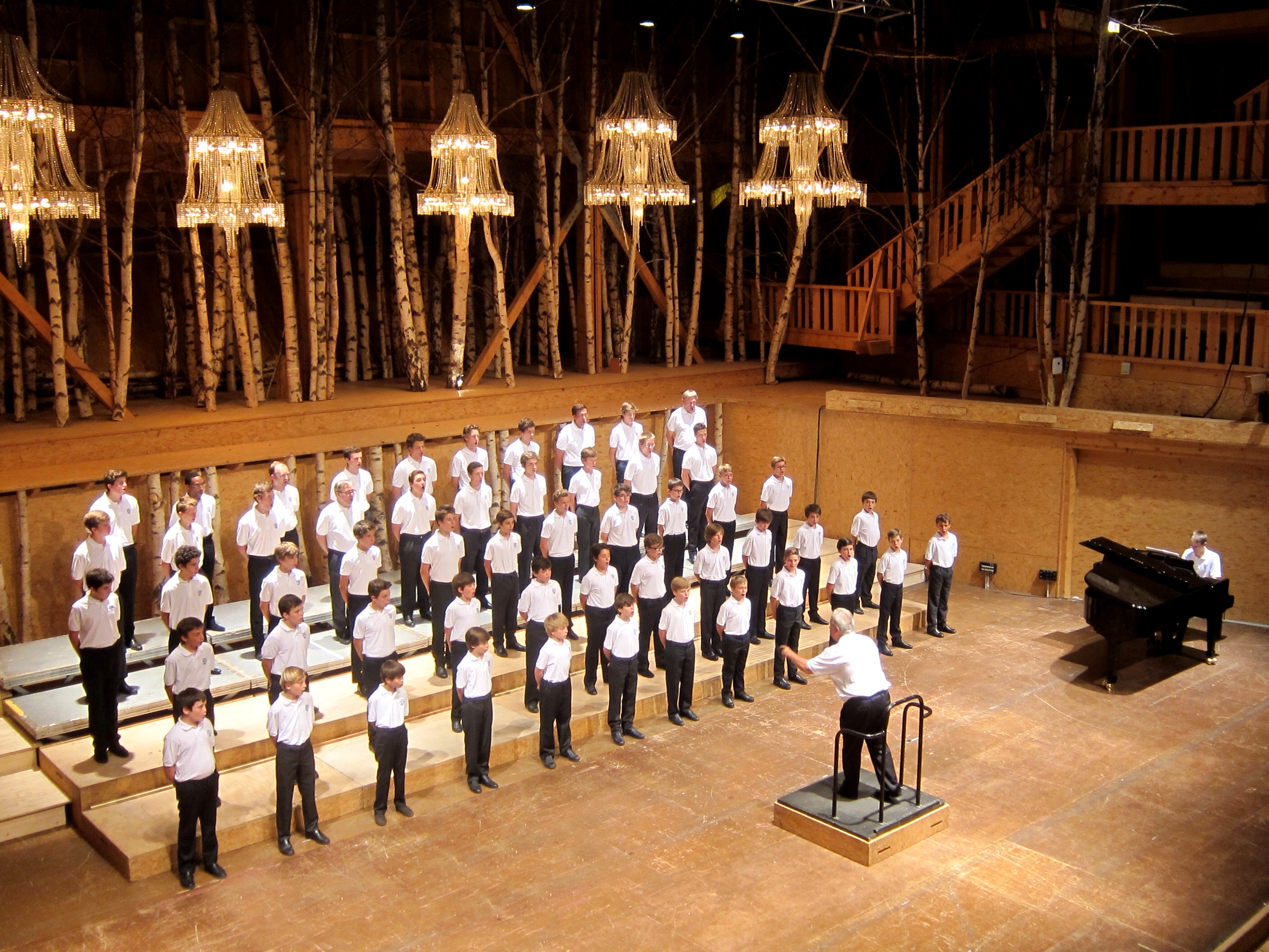 Les Petits Chanteurs de Sainte-Croix de Neuilly - The Paris Boys Choir - Grange au Lac - Evian - Vendredi 1er aout 2014